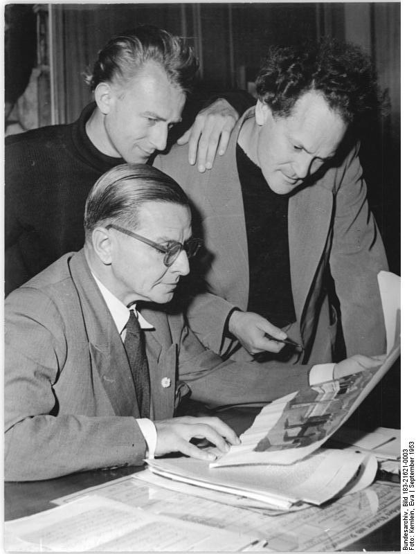 Zentralbild-Kemlein 3.10.1953 Zum Nationalpreis vorgeschlagen. Bühnenbildner und Dozent an der Hochschule für angewandte Kunst in Berlin-Weißensee, Professor Heinrich Kilger, wurde zur Auszeichnung mit dem Nationalpreis 1953 vorgeschlagen. UBz: Besprechung eines Bühnenbild-Entwurfs für das Deutsche Theater zwischen Intendant Langhoff, Dramaturg Dr. Kipphardt (Mitte) und Professor Kilger (rechts).